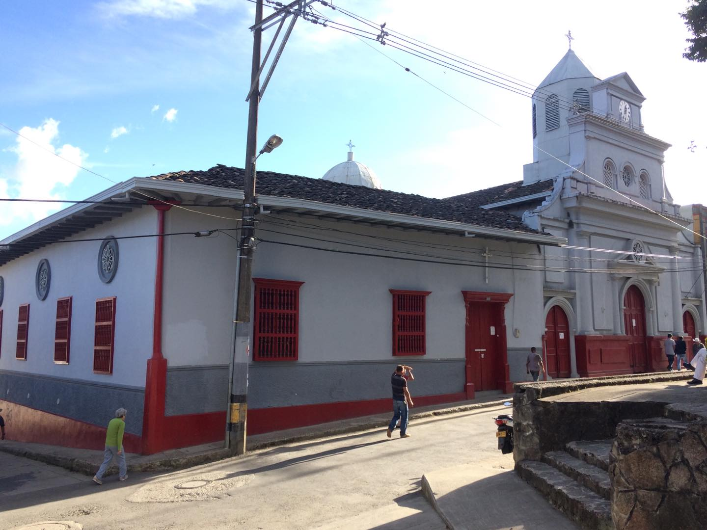 Aspecto del frontis principal del Santuario de Valvanera en Sonsón.